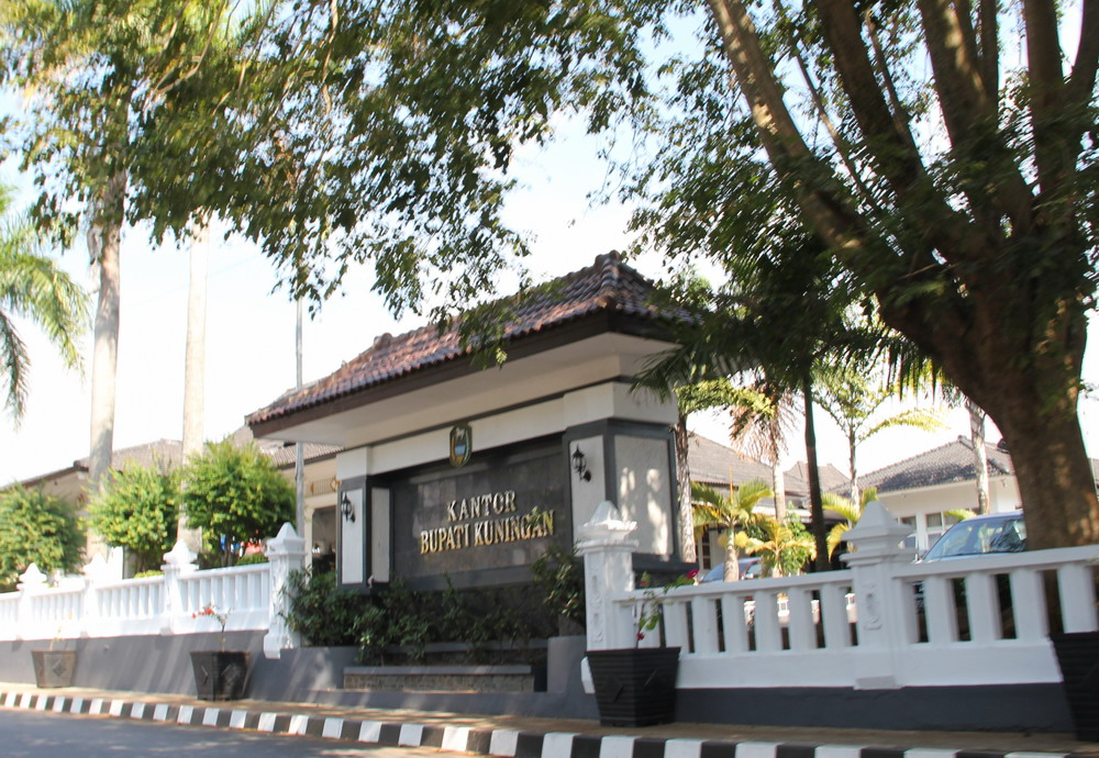 Kantor Bupati Kabupaten Kuningan-Jawa Barat Jl Siliwangi, Kota Kuningan. Date 25 Juli 2012 Foto Jie73